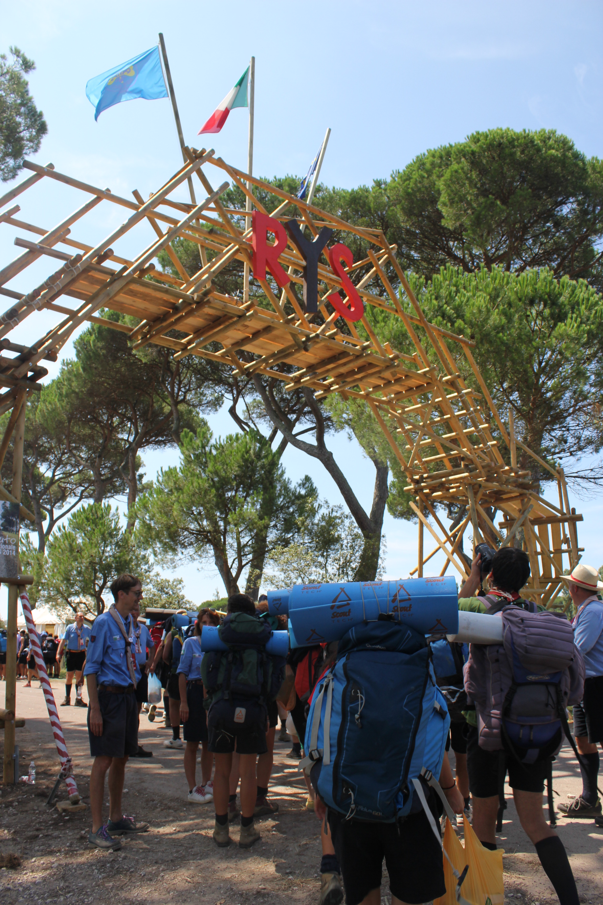 Portale di ingresso al campo fisso ed alla via del coraggio